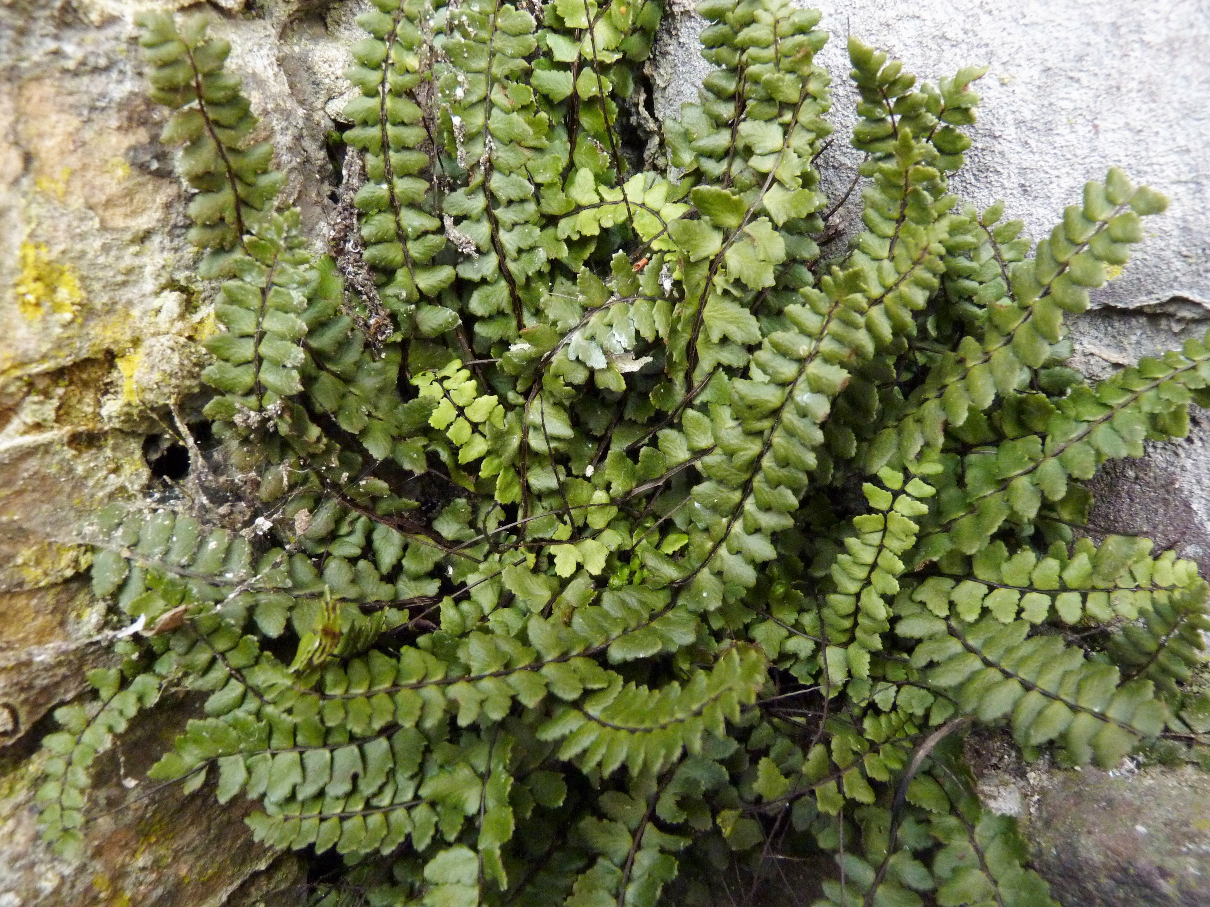 Asplenium trichomanes subsp. pachyrachis.